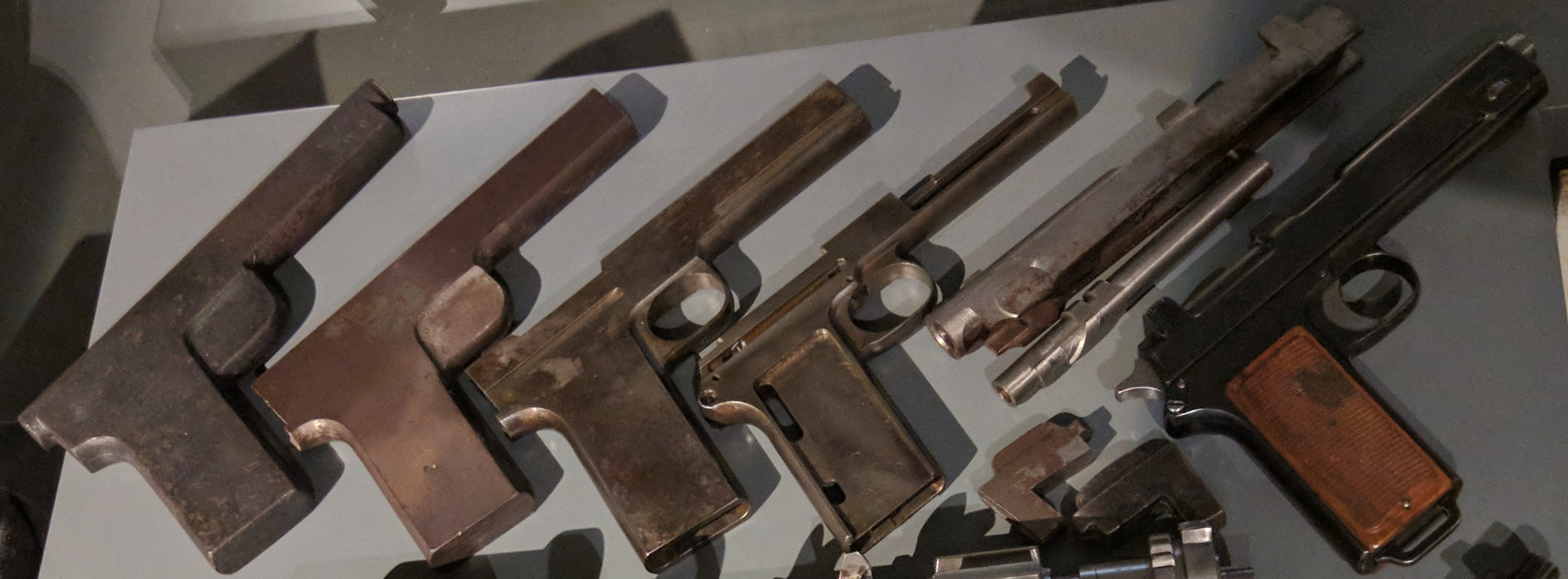 Postopek izdelave avstroogrskege pištole Steyr-Hahn